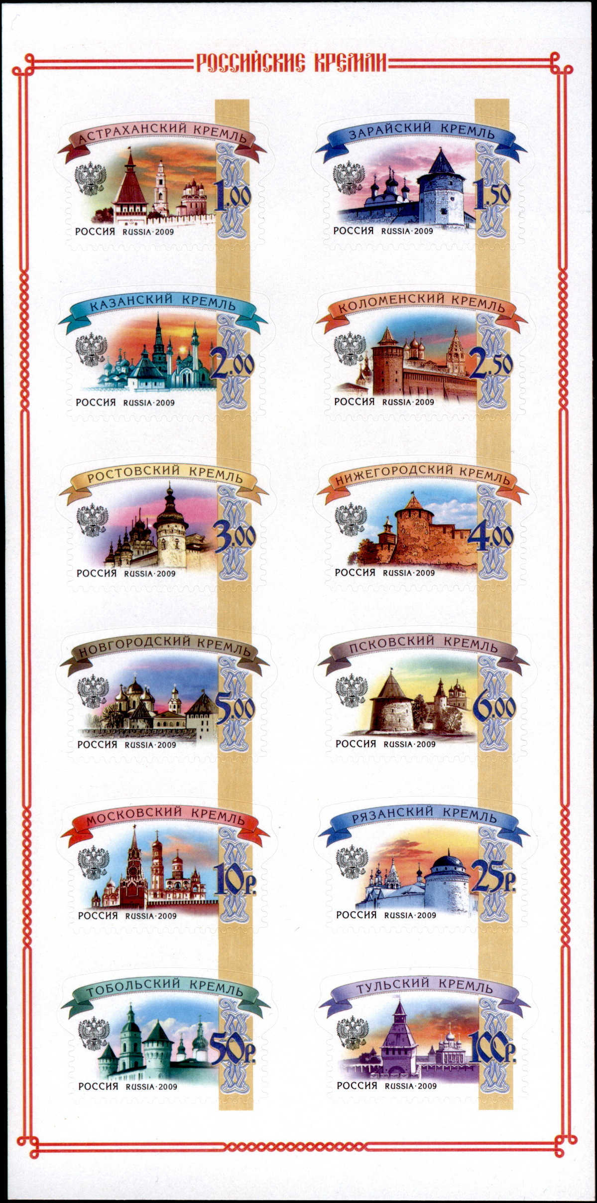 Шестой выпуск стандартных почтовых марок Российской Федерации (2009)